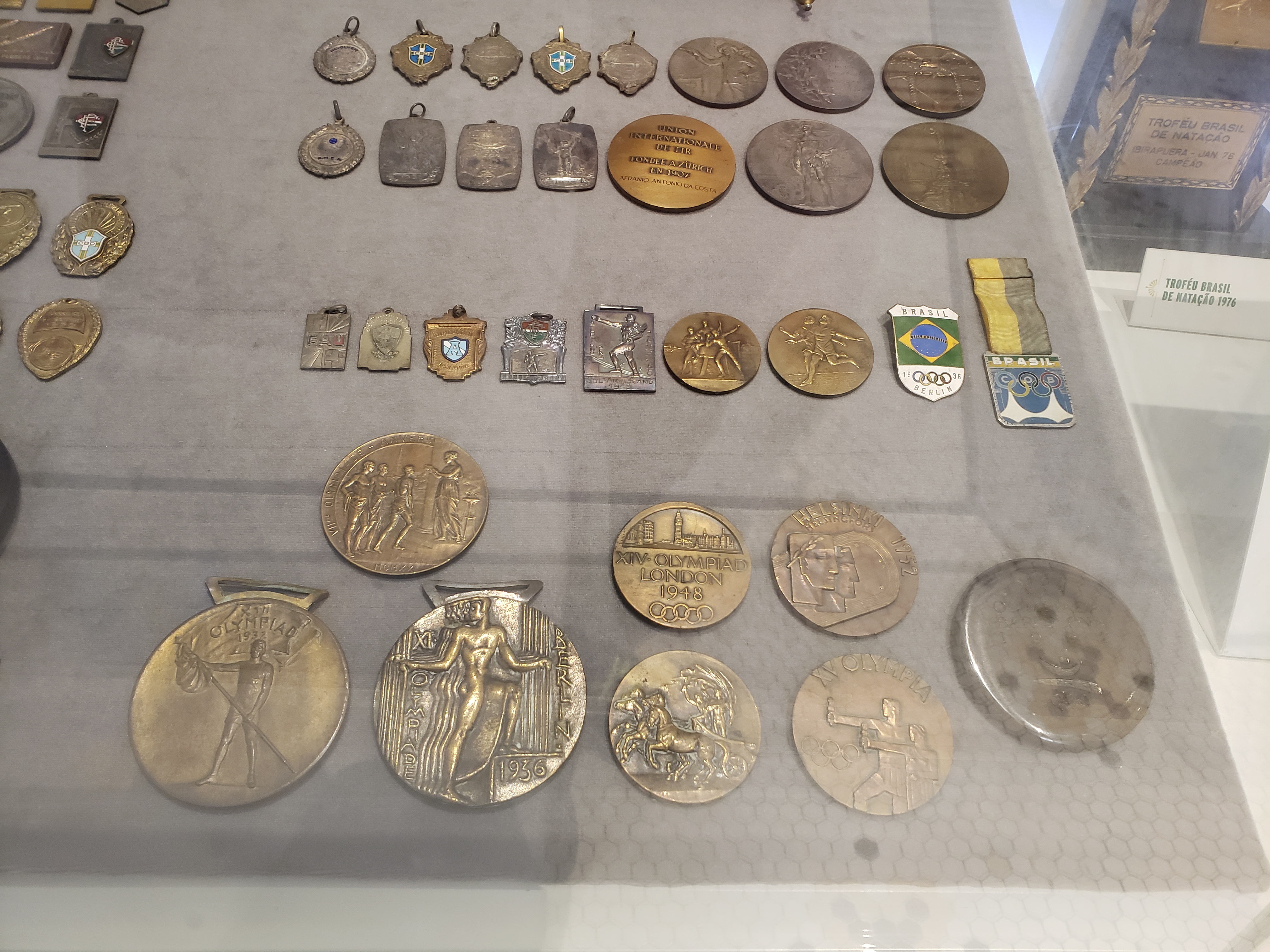 Algumas medalhas importantes conquistadas por atletas do Fluminense Football Club, inclusive olímpicas, em exposição na Sala de Troféus do clube.